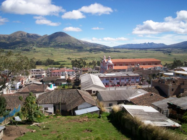 Panorámica de Guachucal.